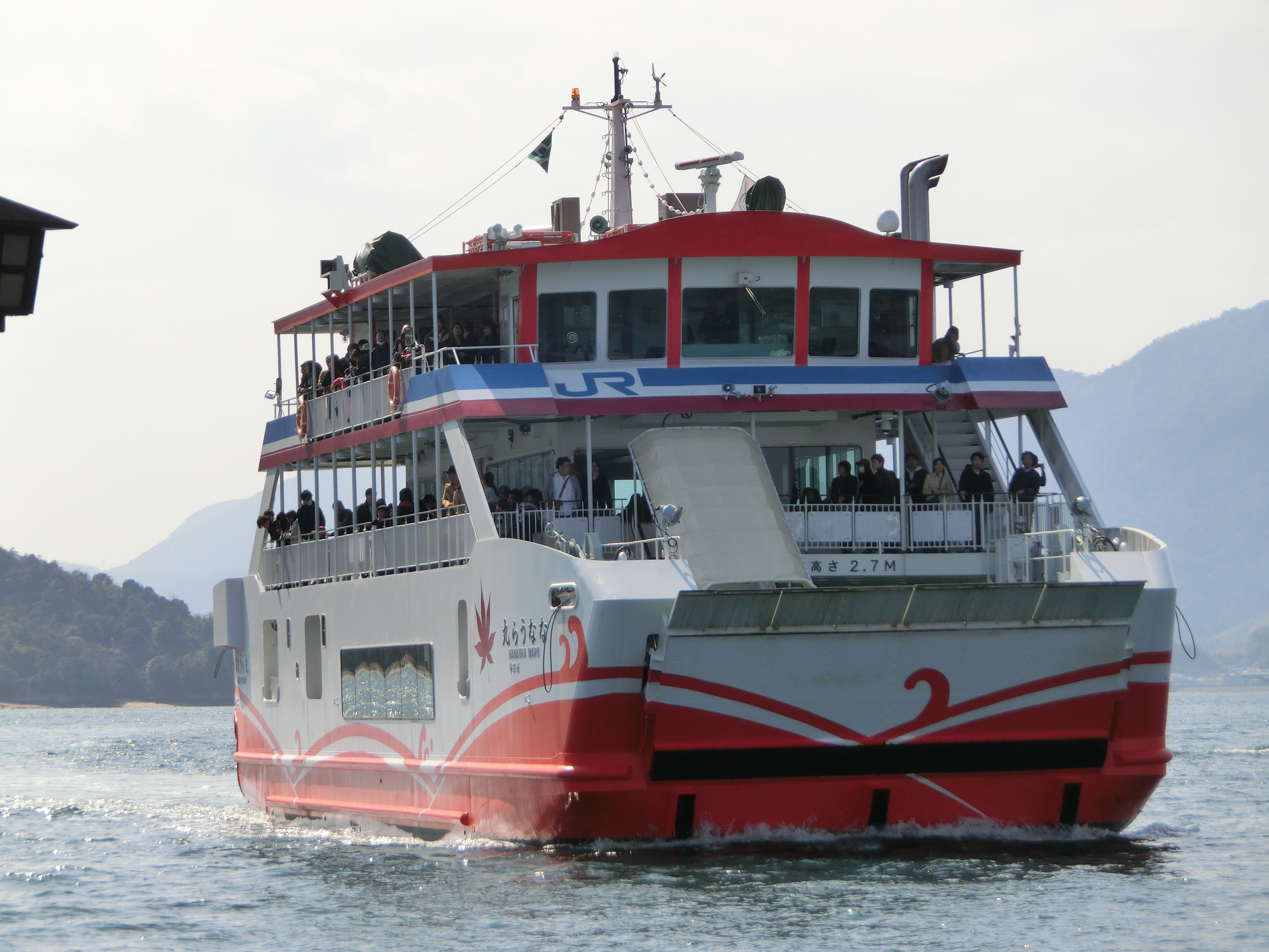 JR西日本フェリー ななうら丸